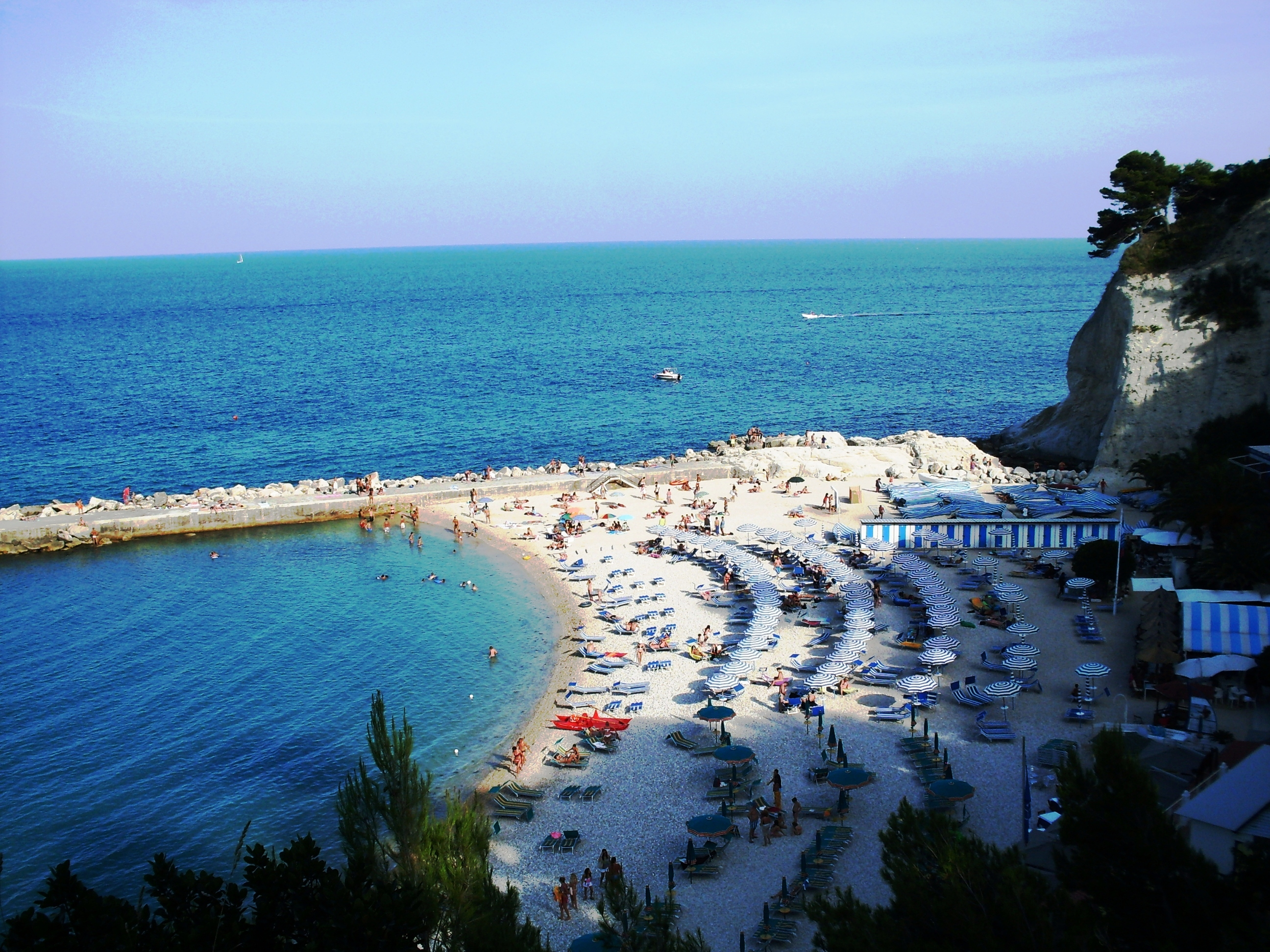 Sirolo spiaggia sottostante